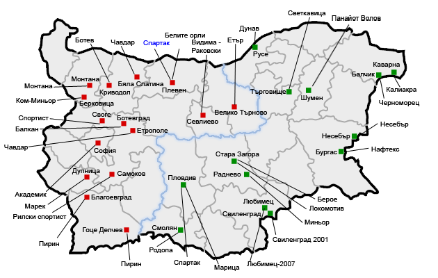 Карта на България показваща местоположението на футболните отбори в Б групите за 2008/09 Map of Bulgaria showing B groups 2008/09 football teams' locations